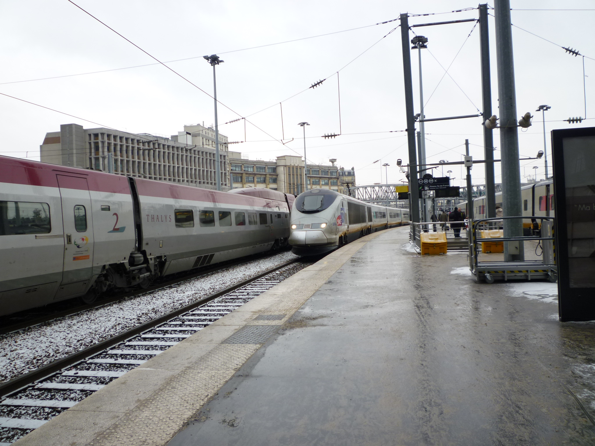 TGV arrivant gare du nord à Paris